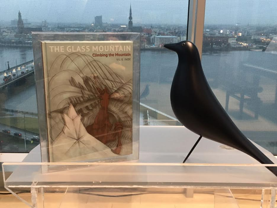 Triloģija "The Glass Mountain"